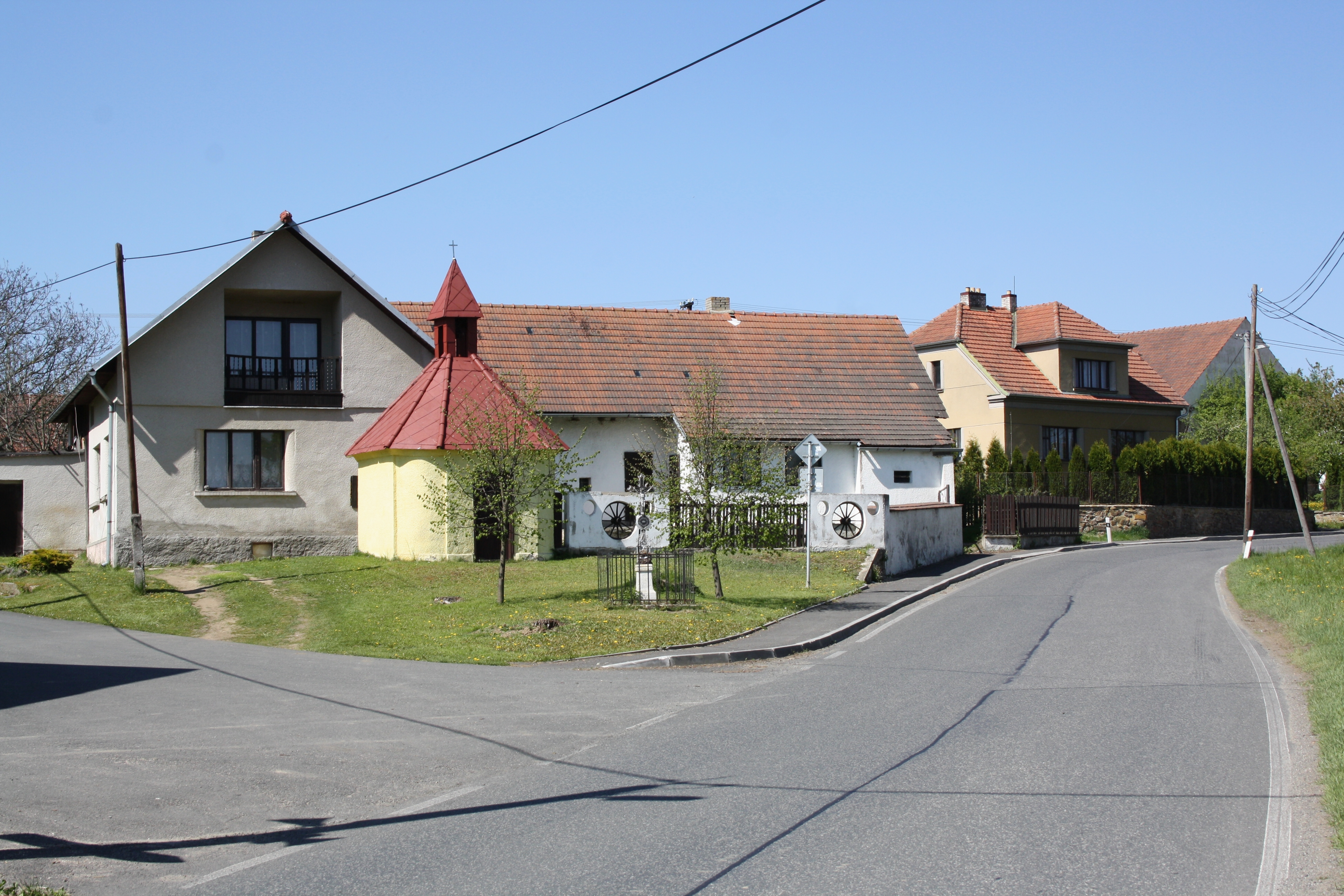 Staré Práchňany - náves s kapličkou a křížkem